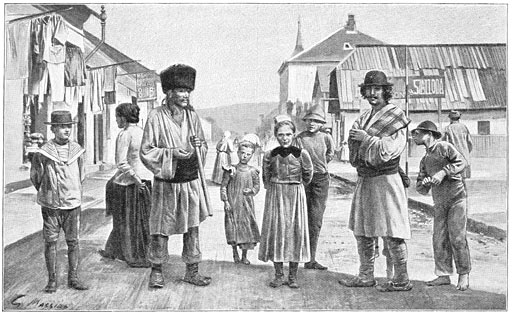 "Het stadje Pétrozény" (Petroşani)